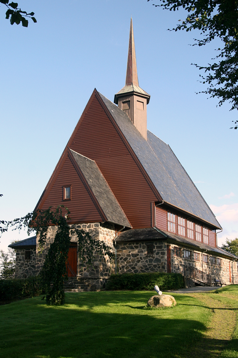 Julebygda kapell, built 1957. Sandnes. Arkitekt Valdemar Scheel Hansteen (1897–1980).